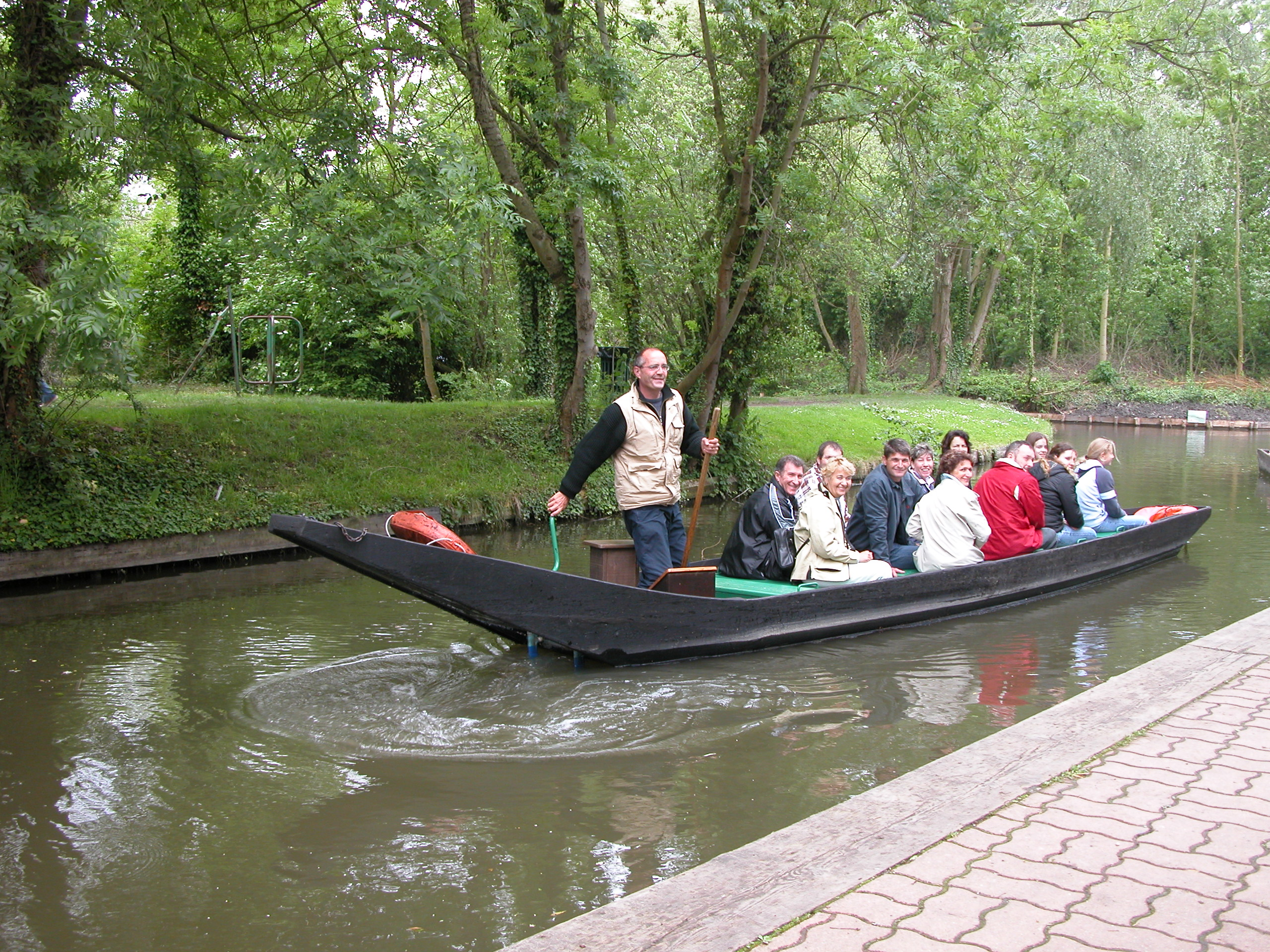 Amiens (Somme, France) - Visite en barque des hortillonages d'Amiens.